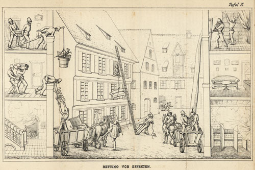 Rettung von Effecten : Alle Theile des Feuer-Lösch-Wesens. Selbstverlag, Ulm (Donau)